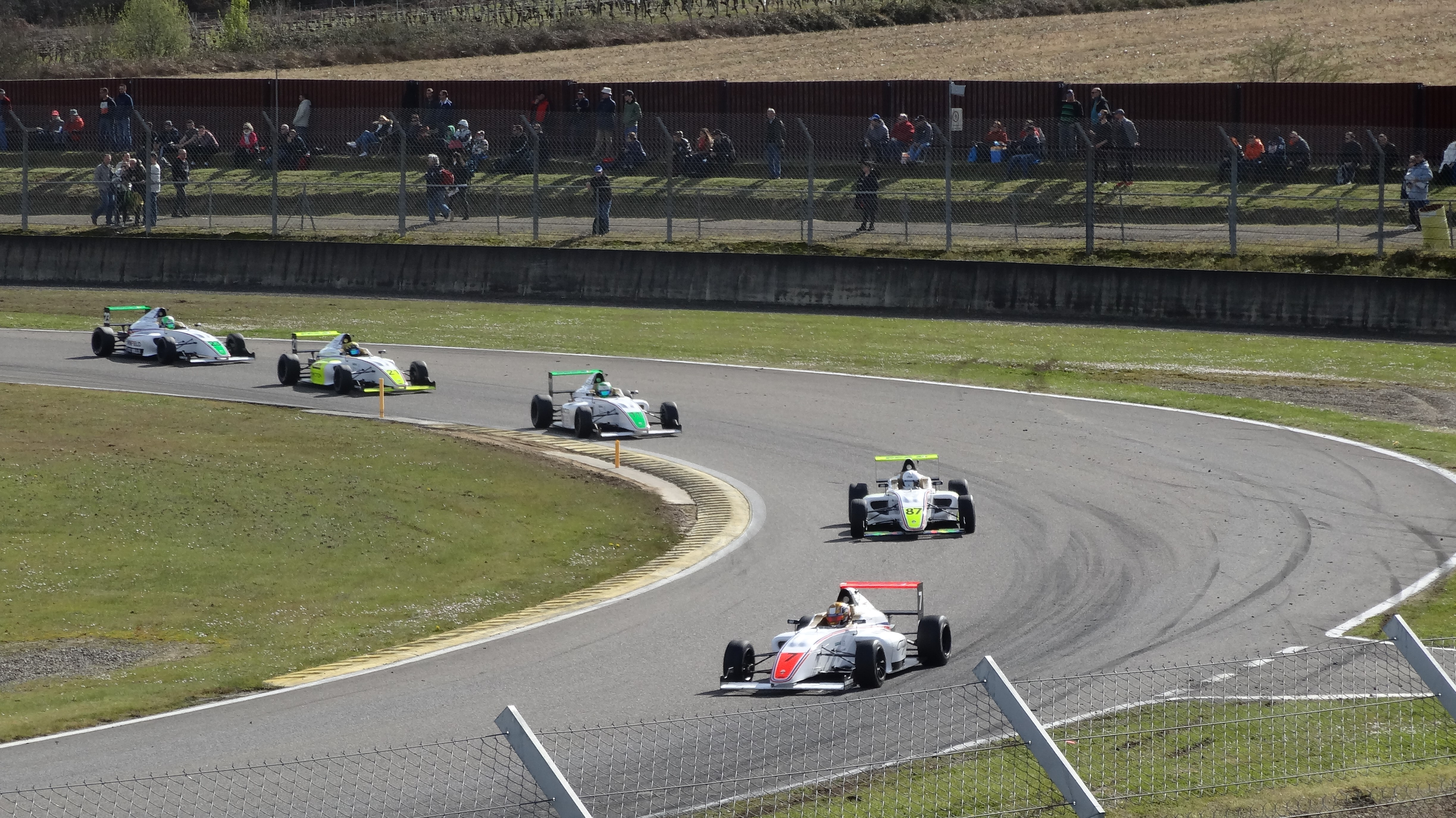 51e Coupes de Pâques (sport automobile), sur le Circuit Paul Armagnac à Nogaro (Gers) : F4 France.